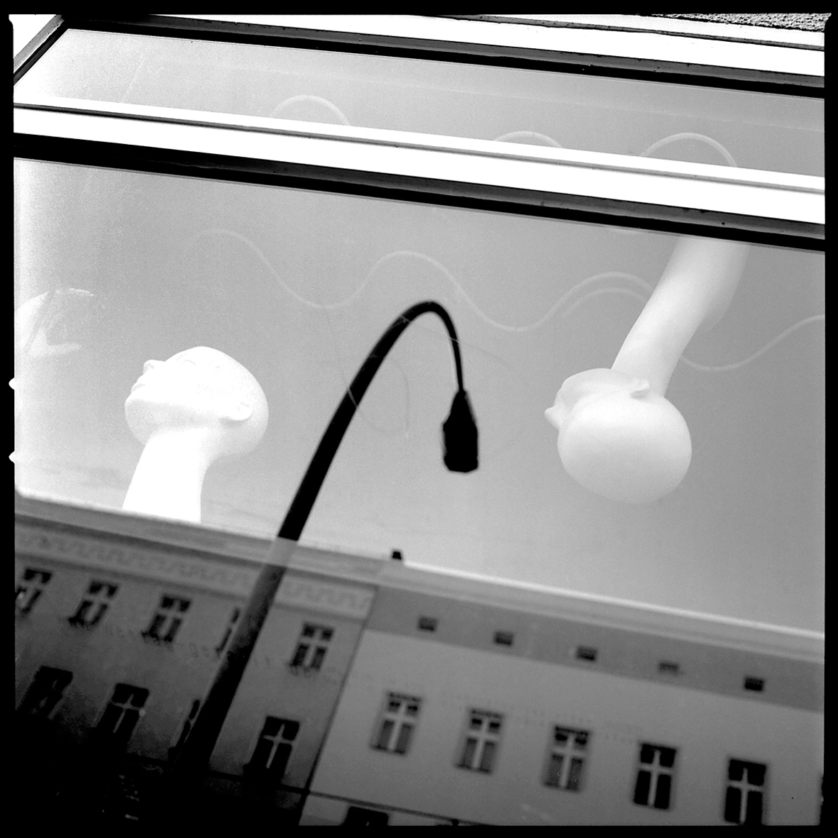 Tomáš Bican, fotografické dílo